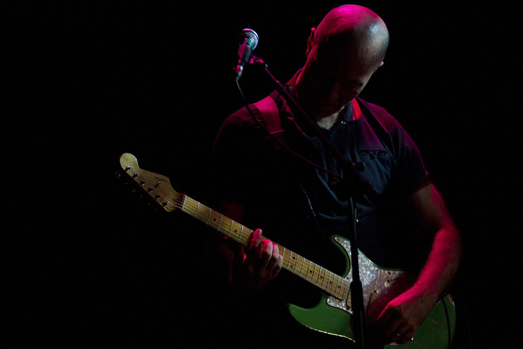 Circo Voador - Lapa - RJ